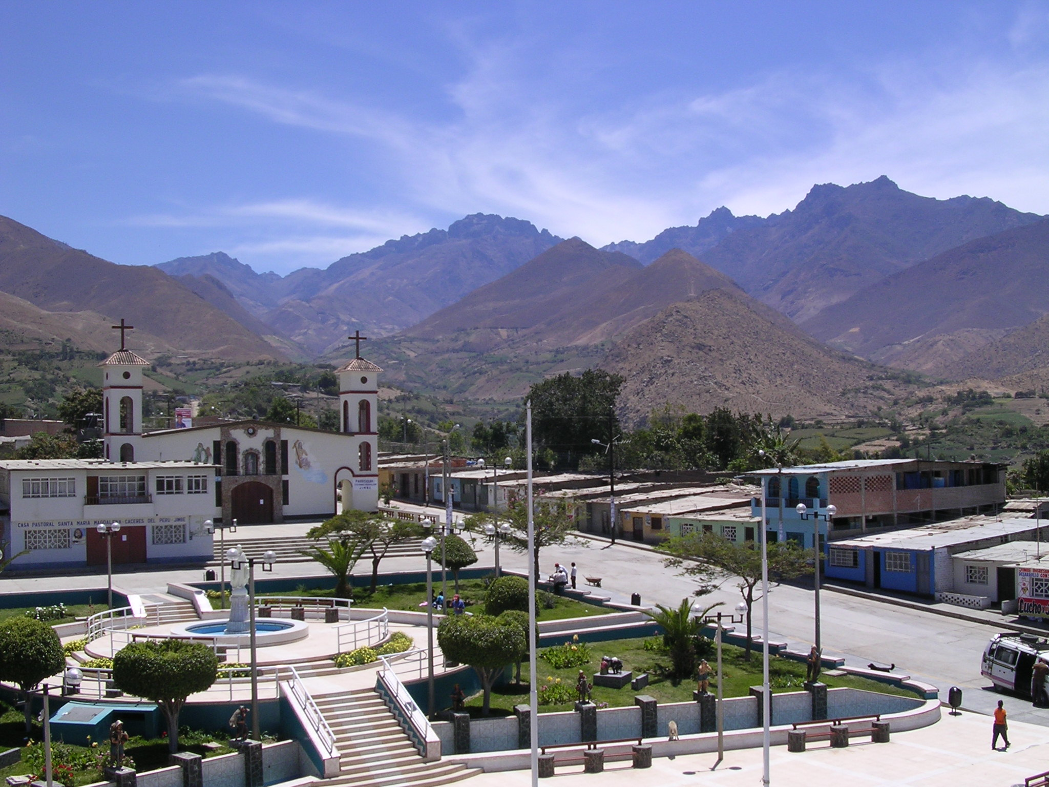 Plaza de Armas de Jimbe, Perú, con la Cordillera Negra al fondo.